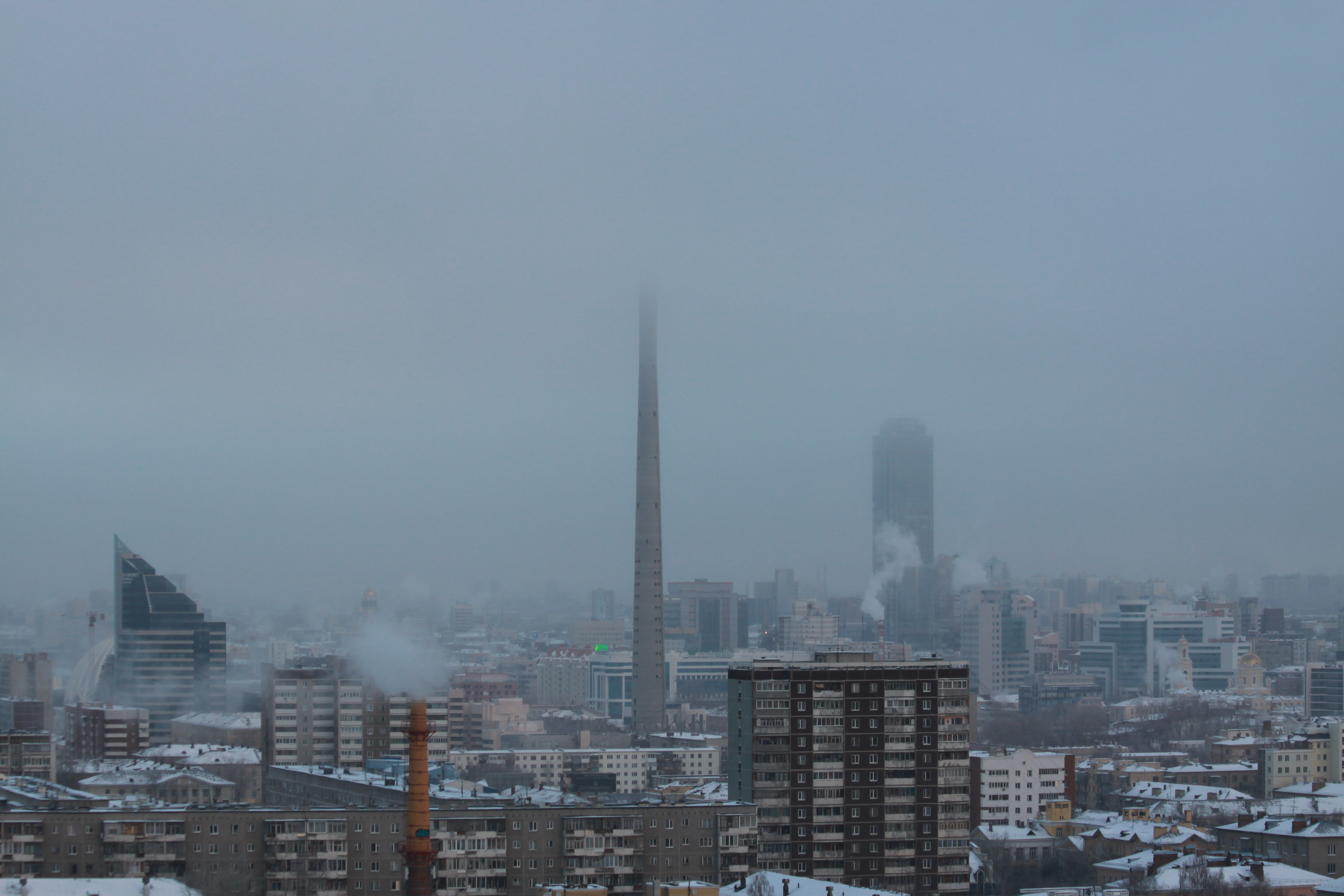 С облаками наравне